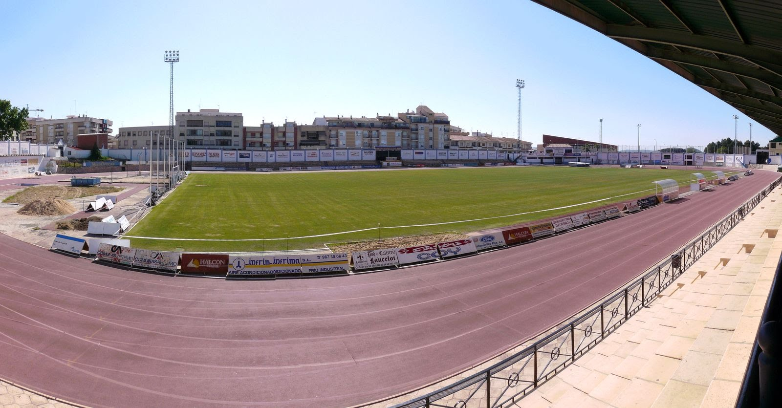 Campo de fútbol de Hellín